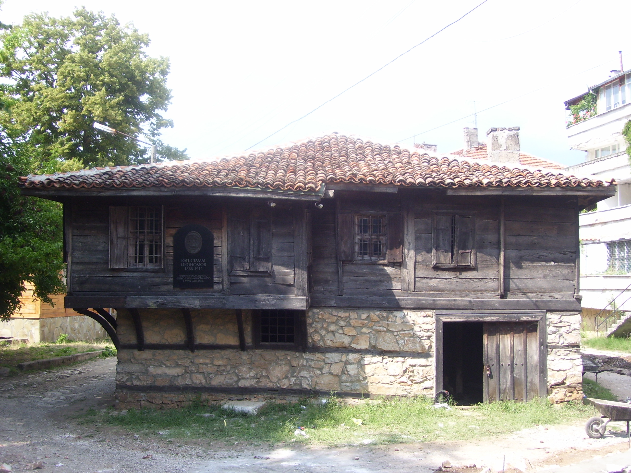 Къщата на капитан Стамат Икономов в Малко Търново.